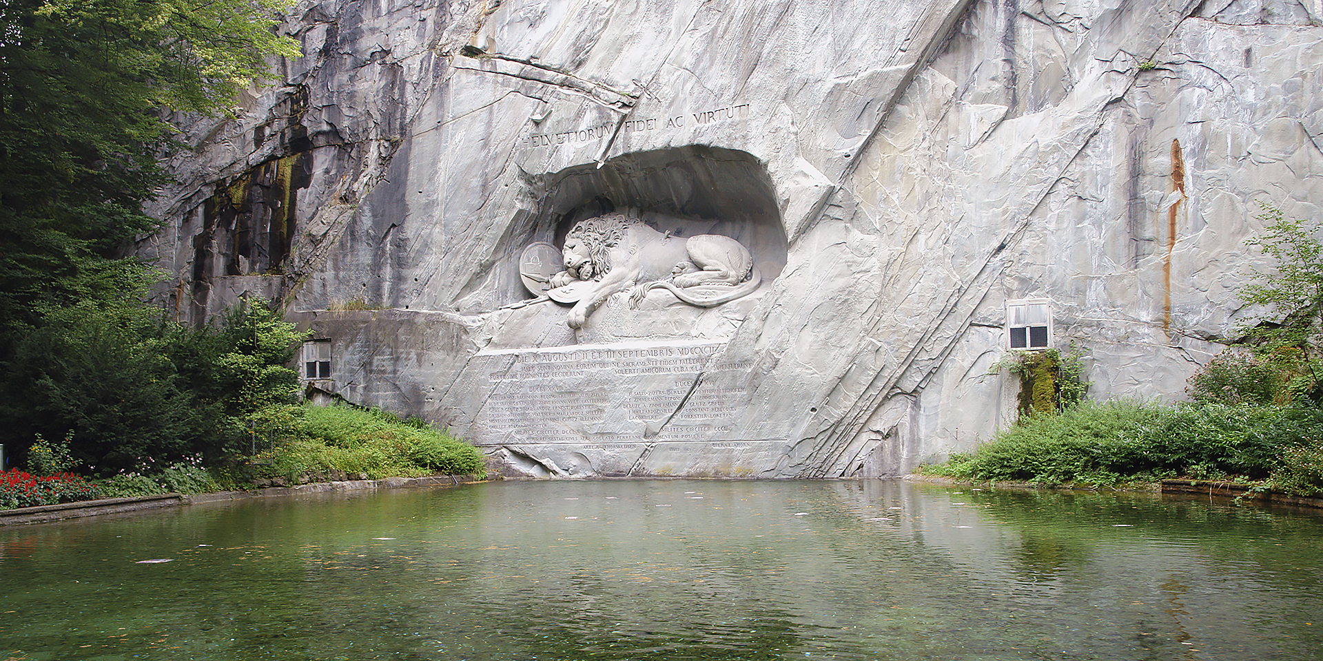 Das Luzerner Löwendenkmal mit dem davorliegenden Teich.